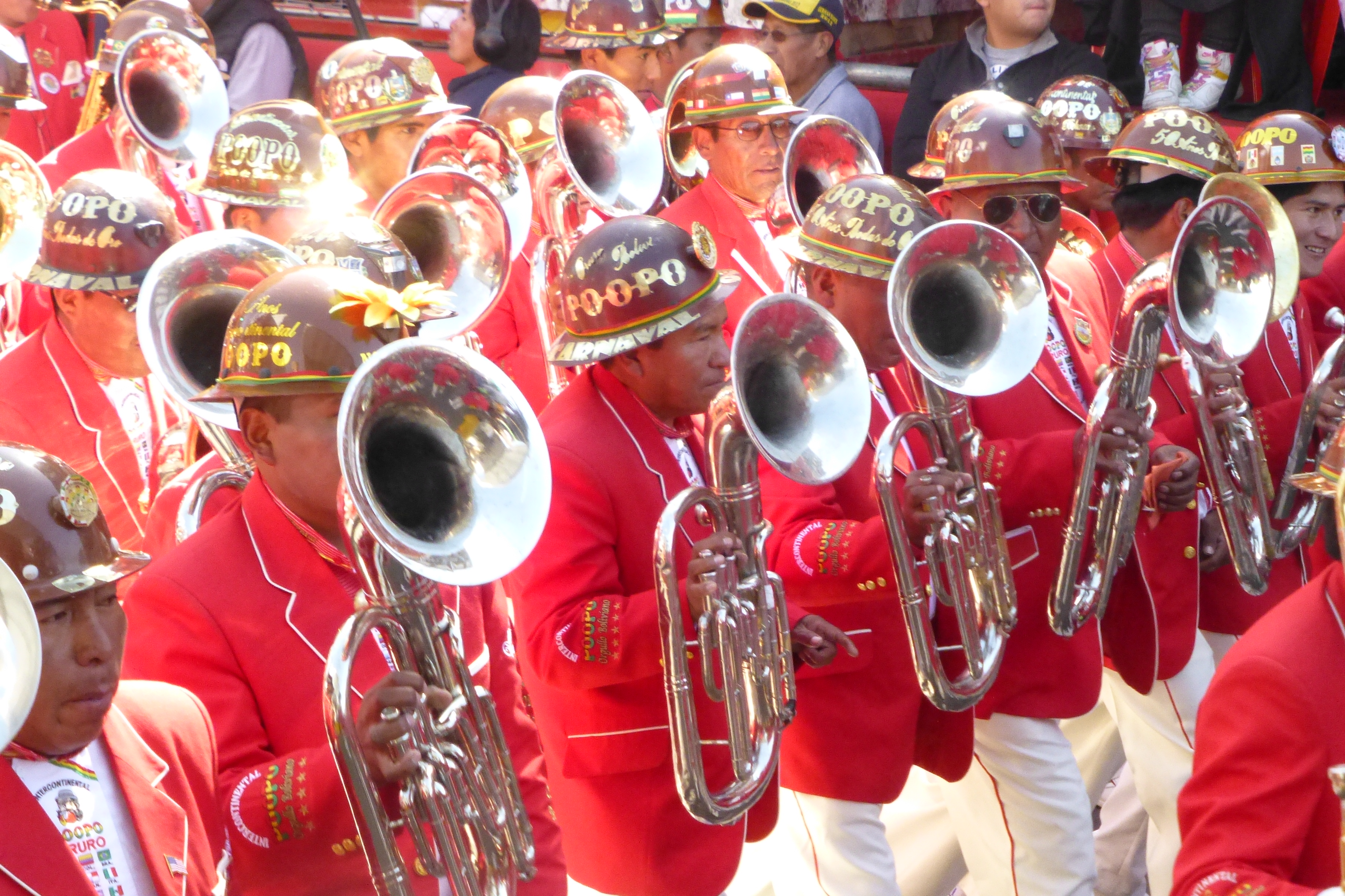 Banda de música folklórica de Bolivia